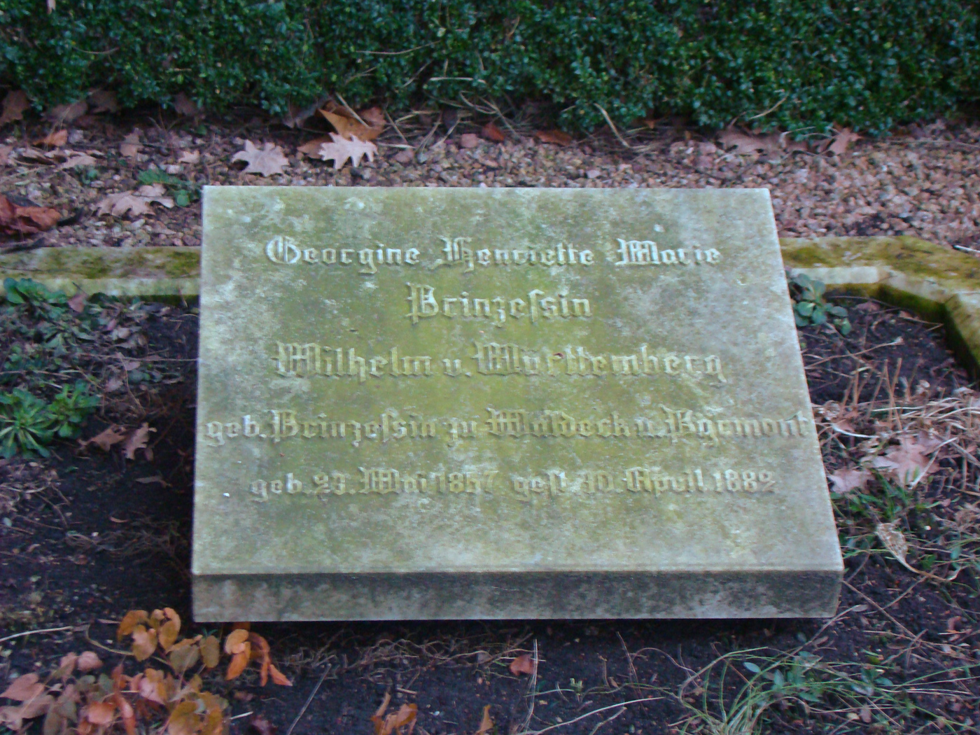 Alter Friedhof in Ludwigsburg, Grabmal Georgine von Württemberg